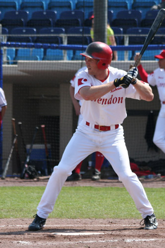 Dirk van 't Klooster aan slag tegen Almere.